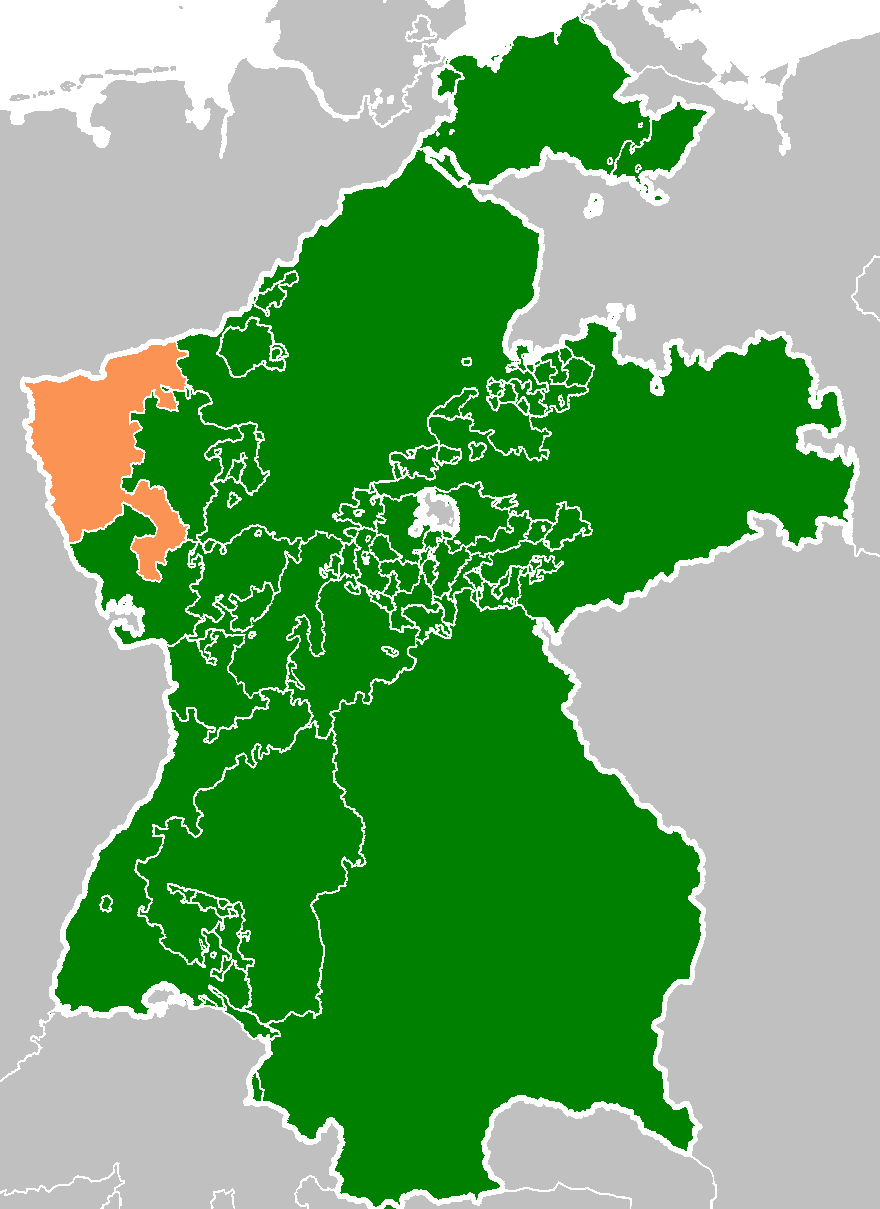 Groothertogdom Berg in de Rijnbond in 1812